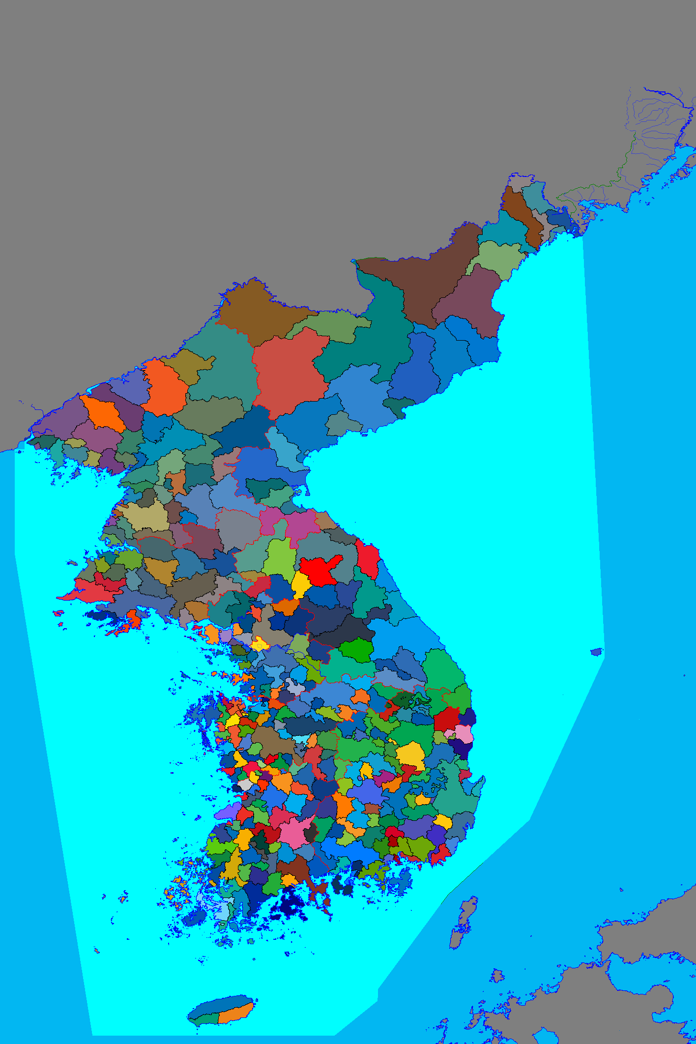 1865年時点での朝鮮での行政区域の地図です